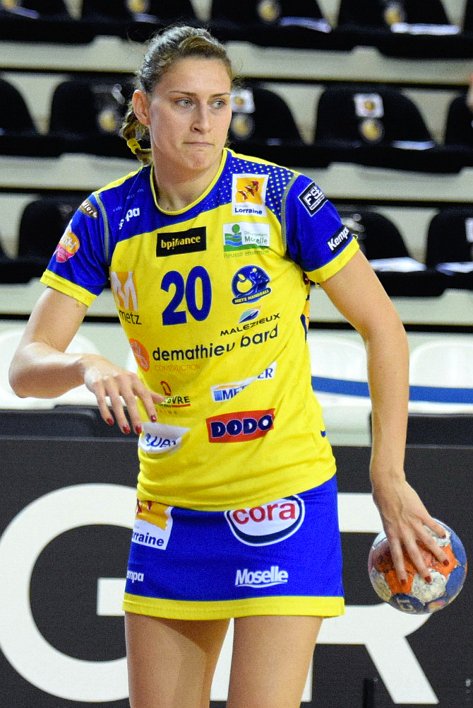 Sladjana Pop-Lazic , le 31 janvier 2016 lors du match Issy Paris Hand / Metz Handball pour le compte de la 14e journée. Au stade Robert Carpentier à Issy-les-moulineaux.